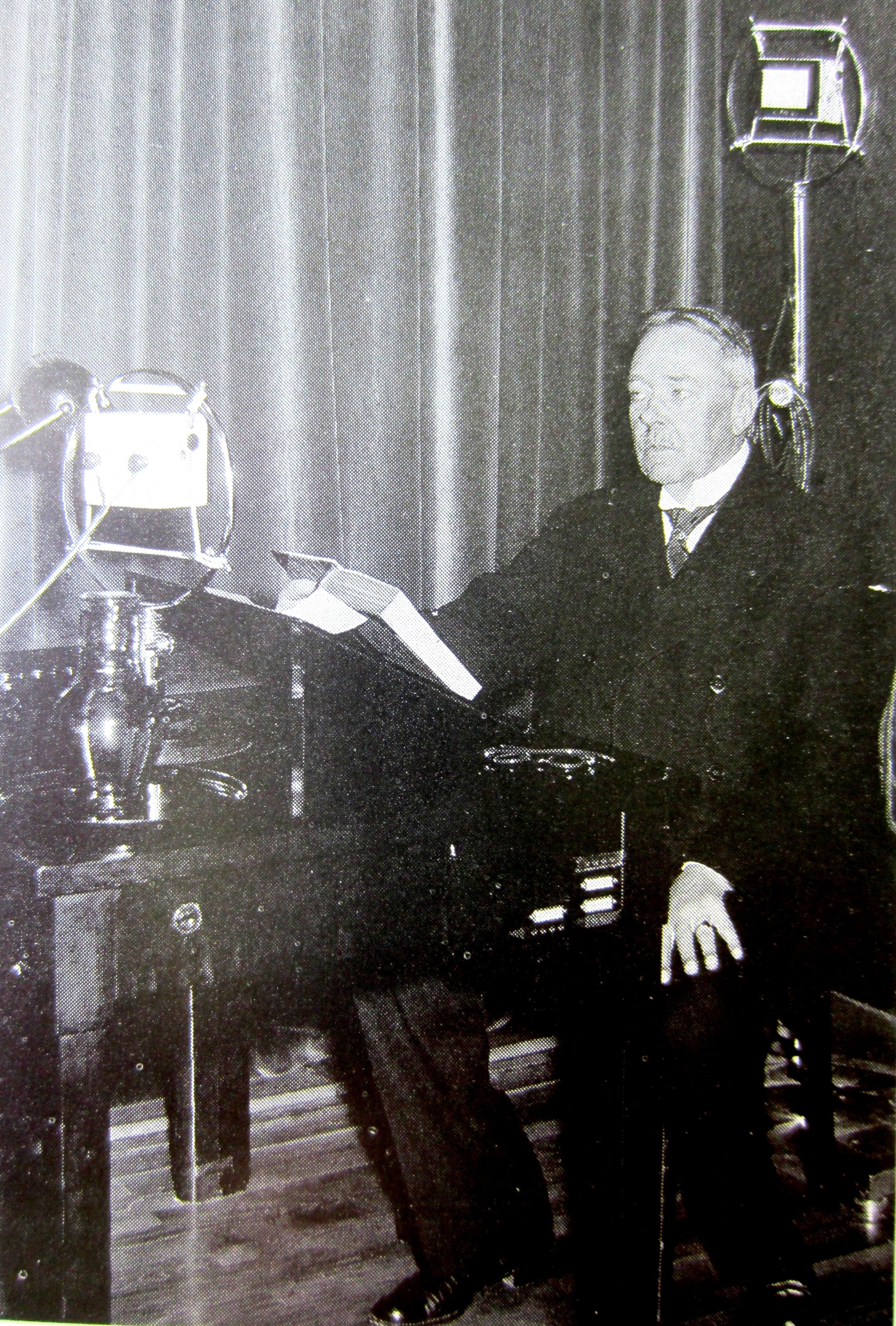 Orginalfotot publicerat i "Veckojournalen" Nr 36 1934.